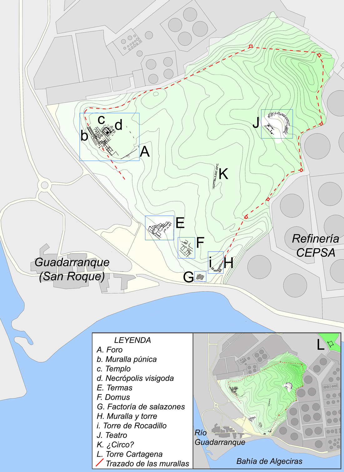 Plano del yacimiento de Carteia (San Roque, Andalucía, España), alrededores y detalle de alguna de las estructuras visibles.